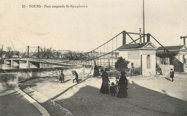 Vieille carte postale représentant le Pont de fil à Tours du temps où il état à péage